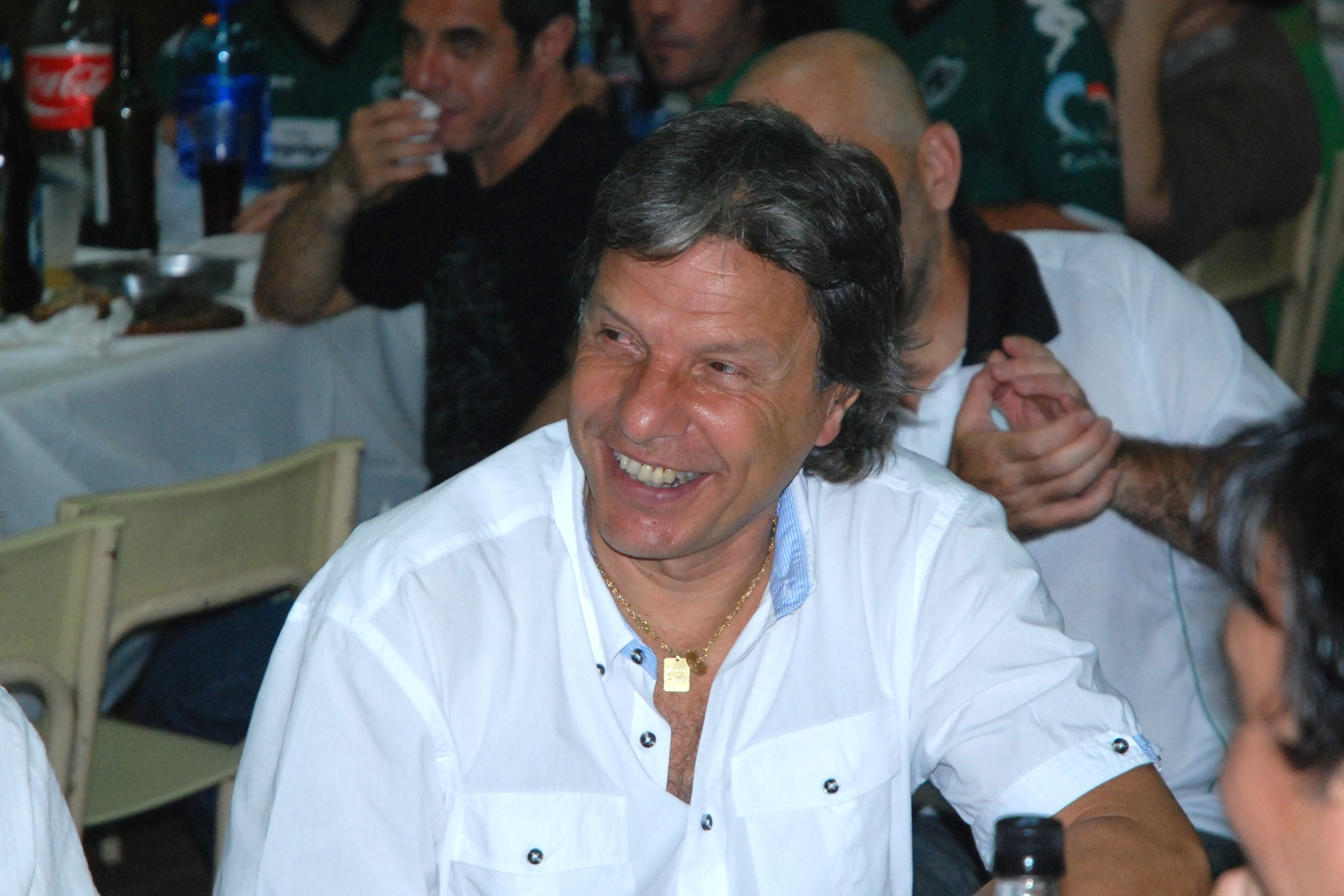 José Raúl "Toti" Iglesias, en la cena de fin de año de la Filial La Plata del Club Atlético Sarmiento de Junín, que lleva su nombre.